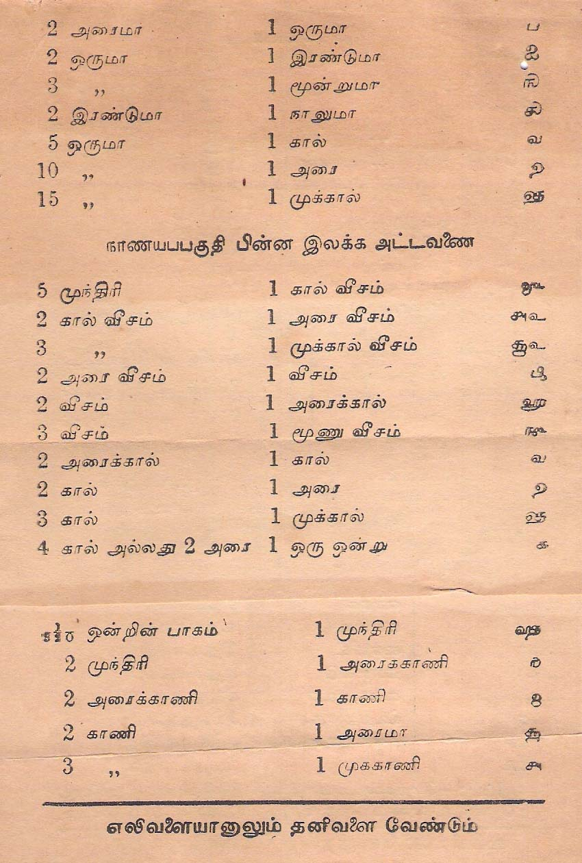 தமிழ்